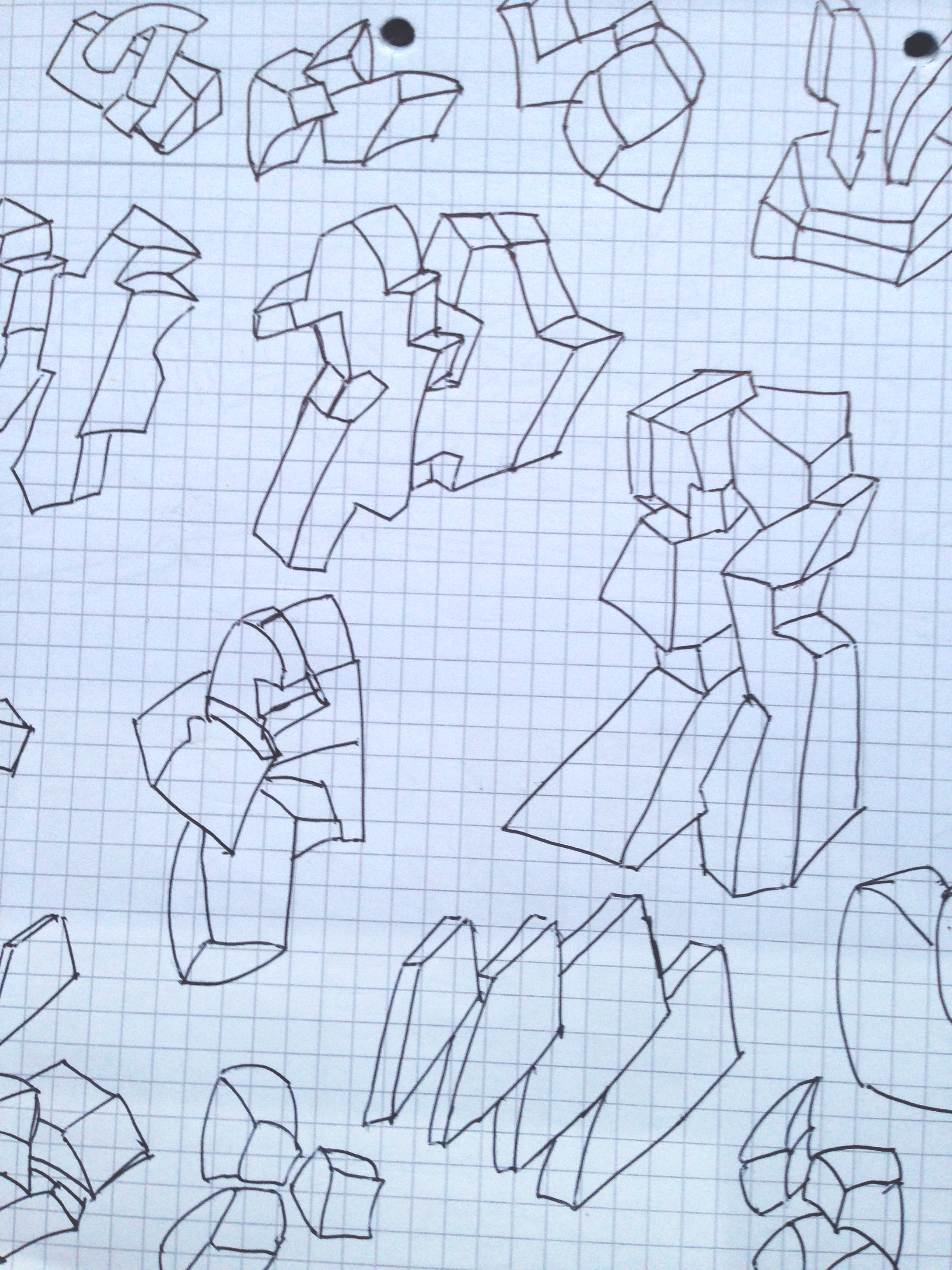 Etude pour Moco Fictions